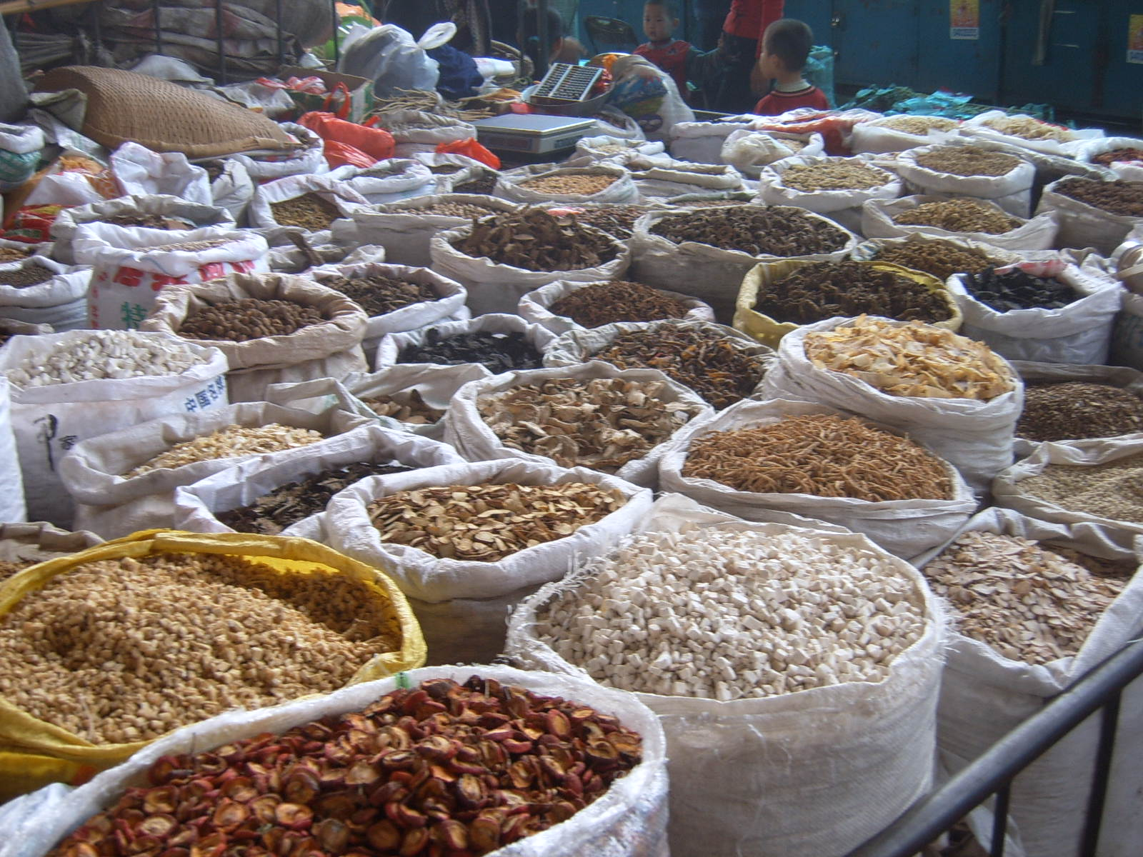 Some elements for Médecine chinoise in Xi'an